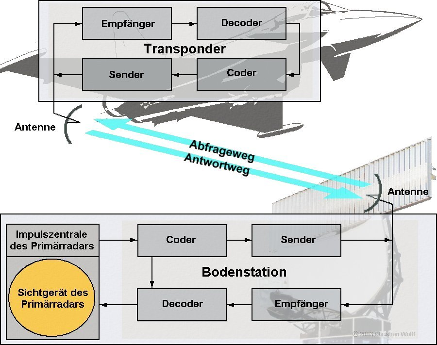 Blockschaltbild eines Sekundärradargerätes